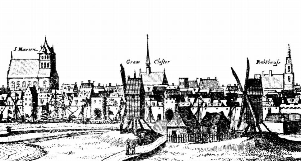 Stadtansicht von Greifswald um 1652. Der Turm des Franziskanerklosters befindet sich in der Mitte hinter der Mühle.